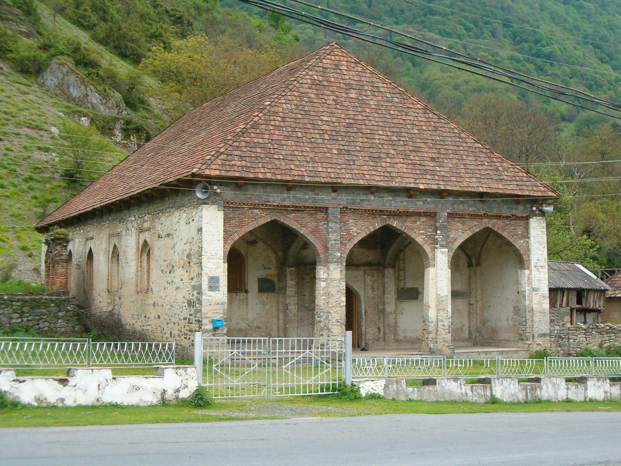 Ulu məscid